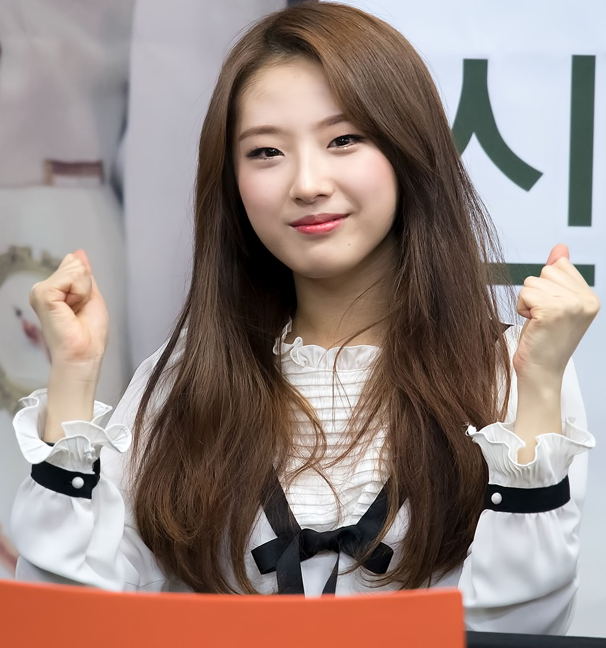 2017.01.21 용산 이달의소녀 팬 사인회 하슬 by 엔타로